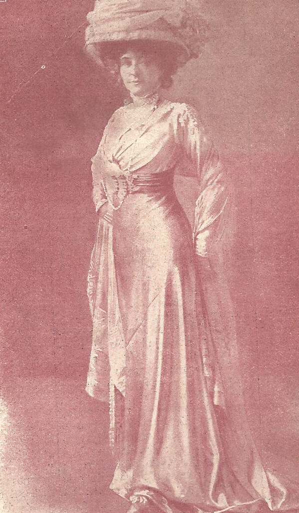 Illustration de la comédie d’Octave Mirbeau (1848-1917), "Le Foyer". "L’Illustration théâtrale", n° 103, décembre 1908.